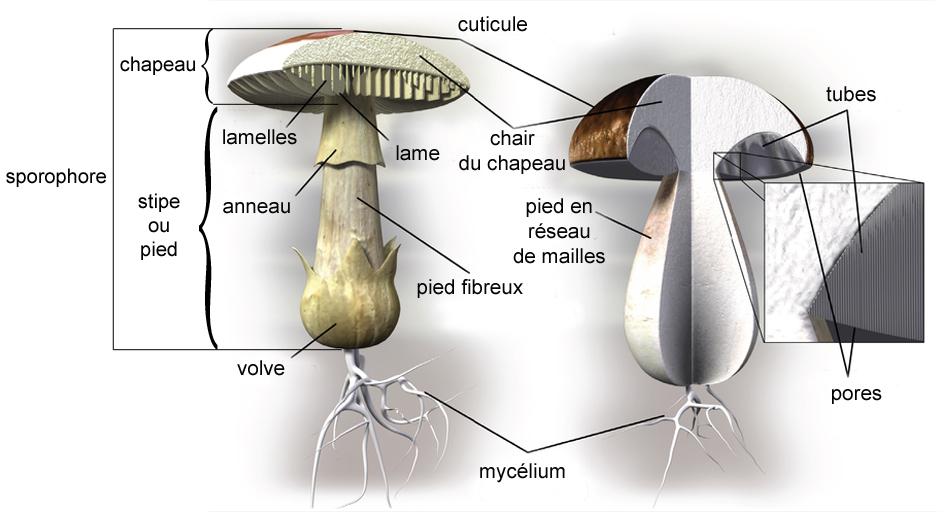 Schéma de champignons.